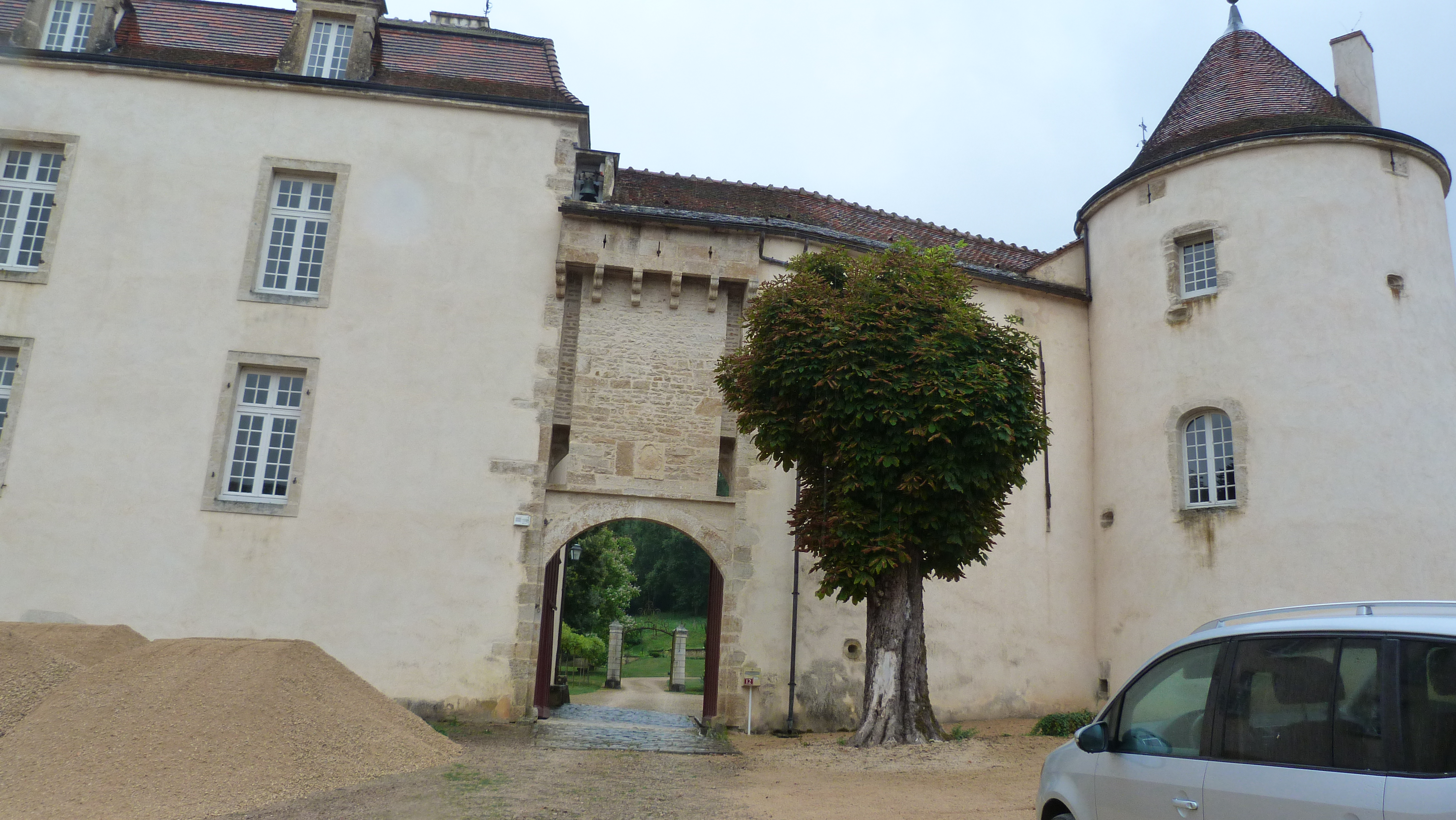 Kastelo de Blancey